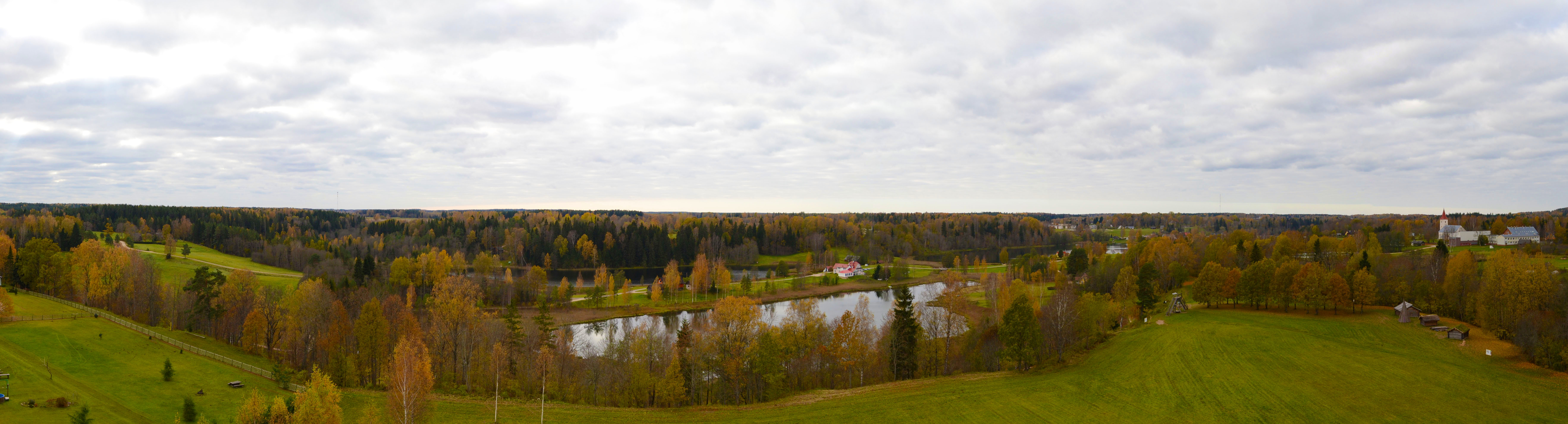 Vaate Ööbikuoru vaatetornist. Tindi küla, taamal paremal Rõuge